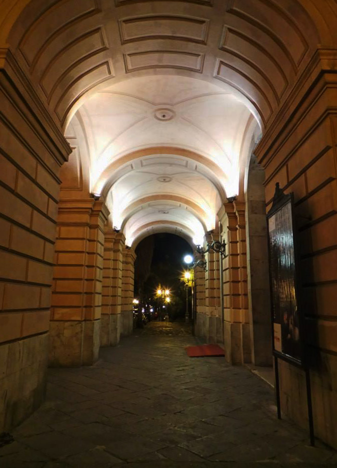 porticato del teatro verdi di salerno